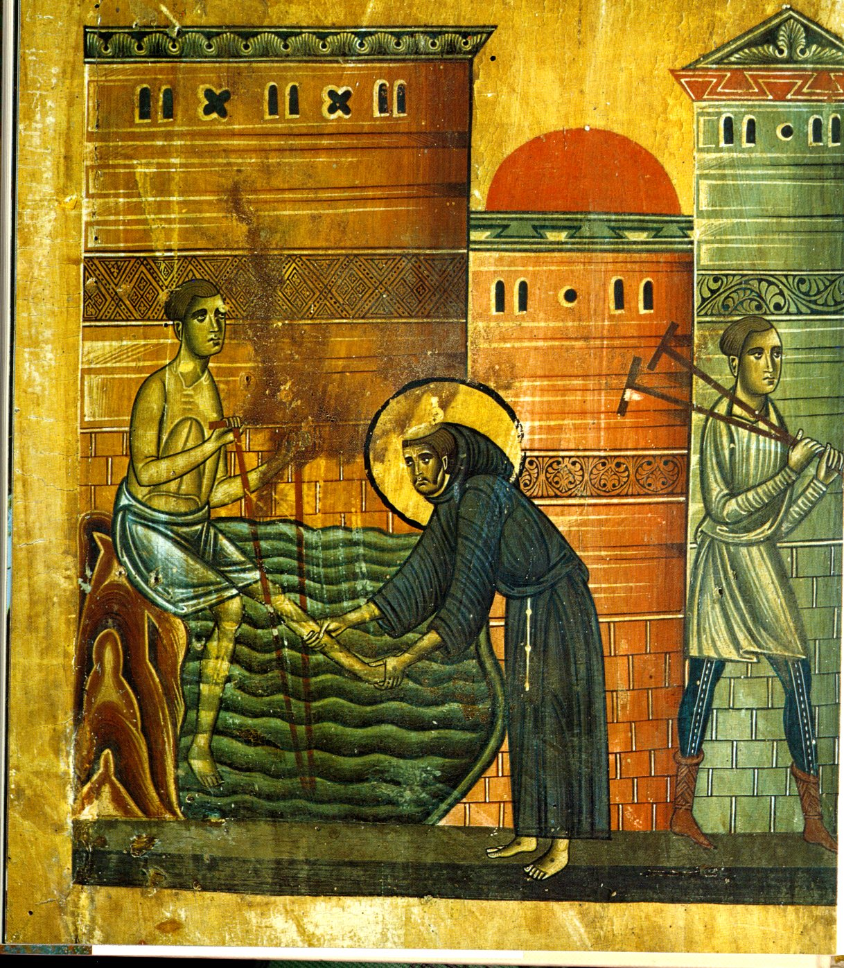 st. Francisco detail св. Франциск деталь/